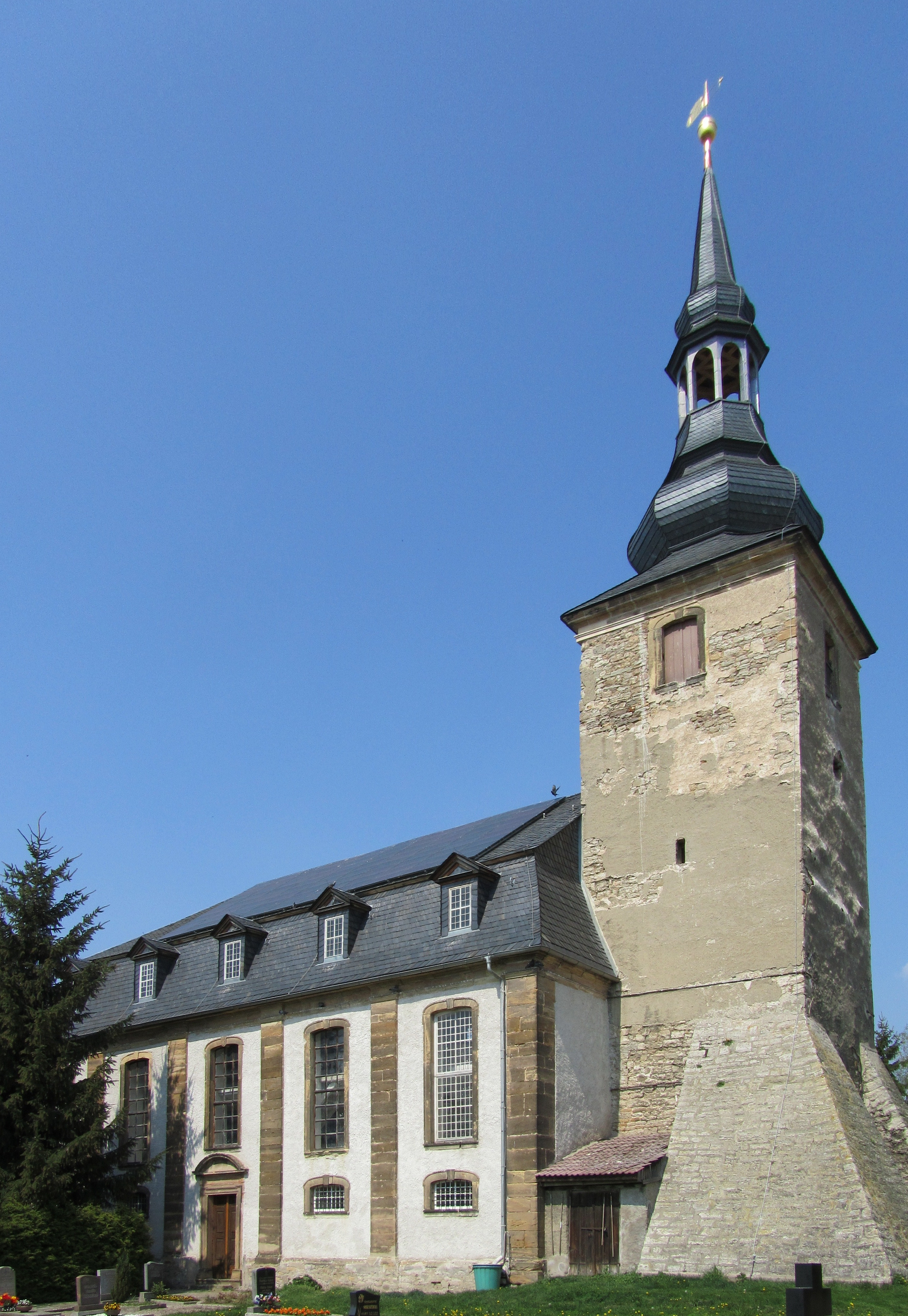 Die Kirche von Kleinneuhausen (Thüringen).